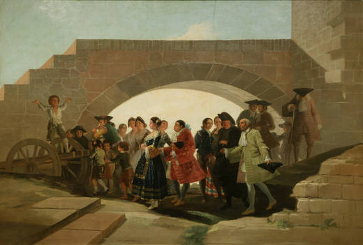 Cartones para tapices